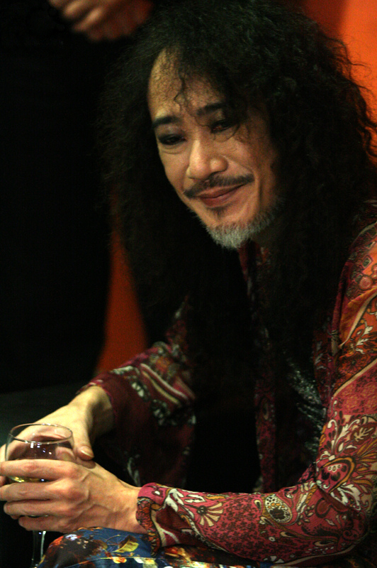 HSBC Brasil - São Paulo/SP - 11/09/2011